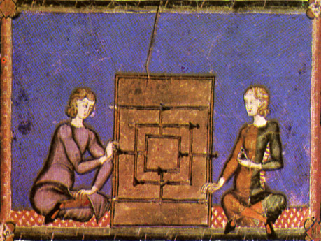 Men playing Nine Men's Morris, pictured in Libro de los juegos.